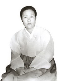 대한민국 제4대 대통령 윤보선의 두번째 부인 공덕귀 사진 (윤보선이 대통령이 되기 직전에 촬영)